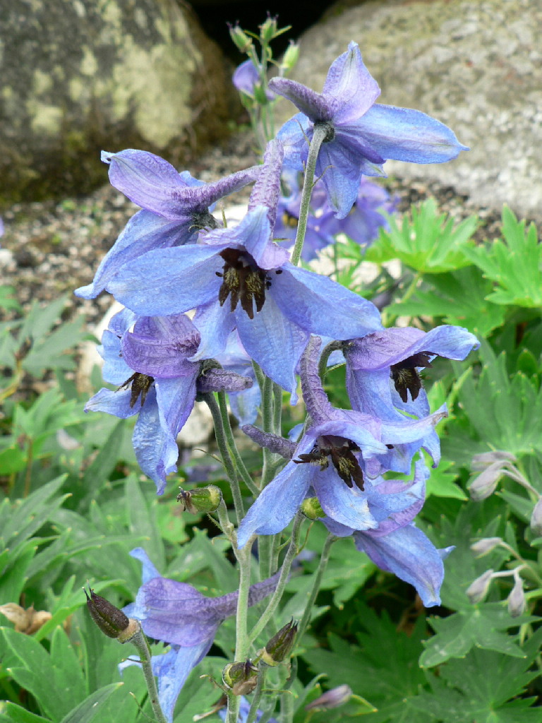 Stračonôžka tatranská